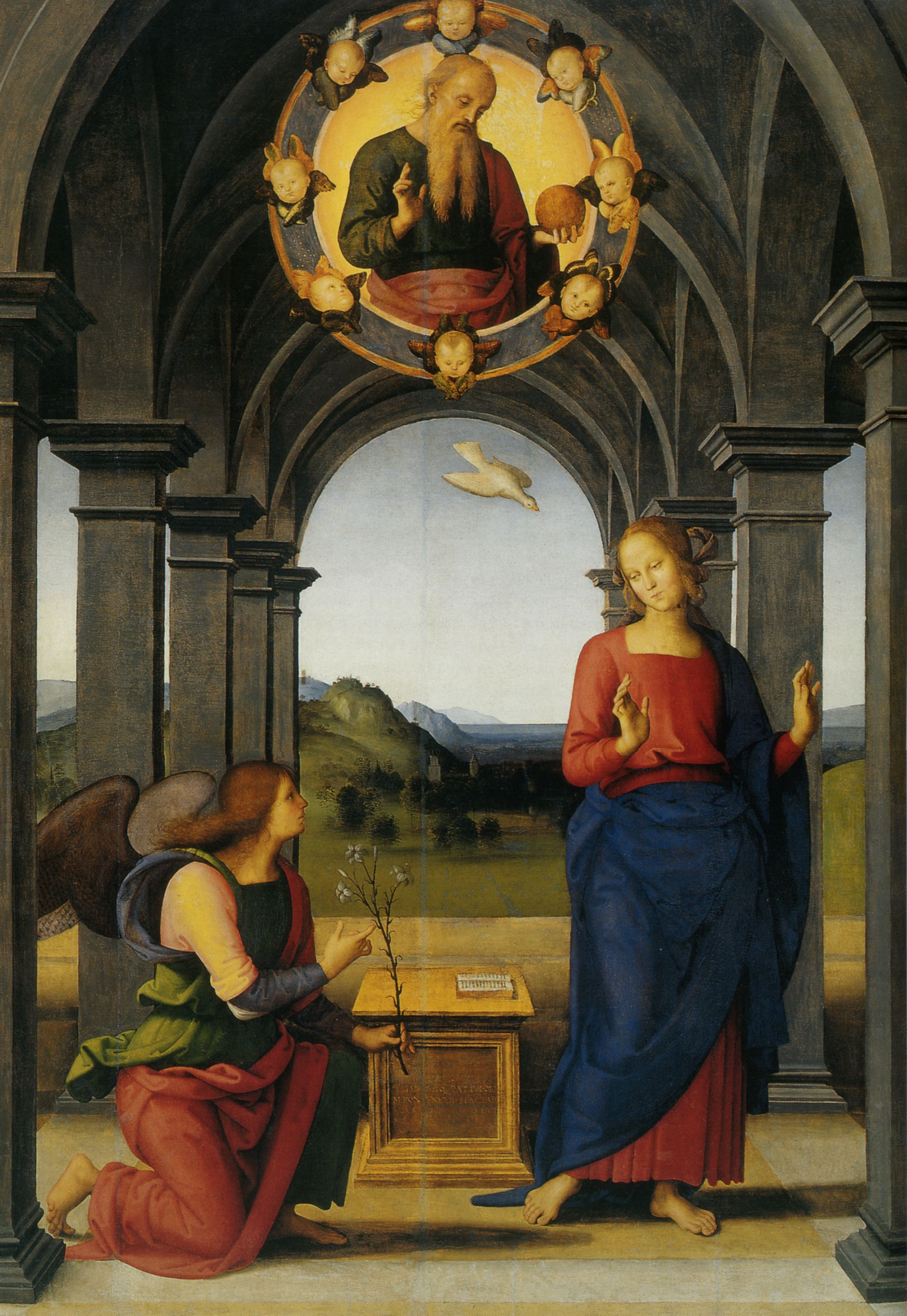 Pietro Perugino: Annunciazione. Cat. no. 23 in Vittoria Garibaldi: Perugino. Catalogo completo. Octavo, Firenze 2000, ISBN 88-8030-091-1